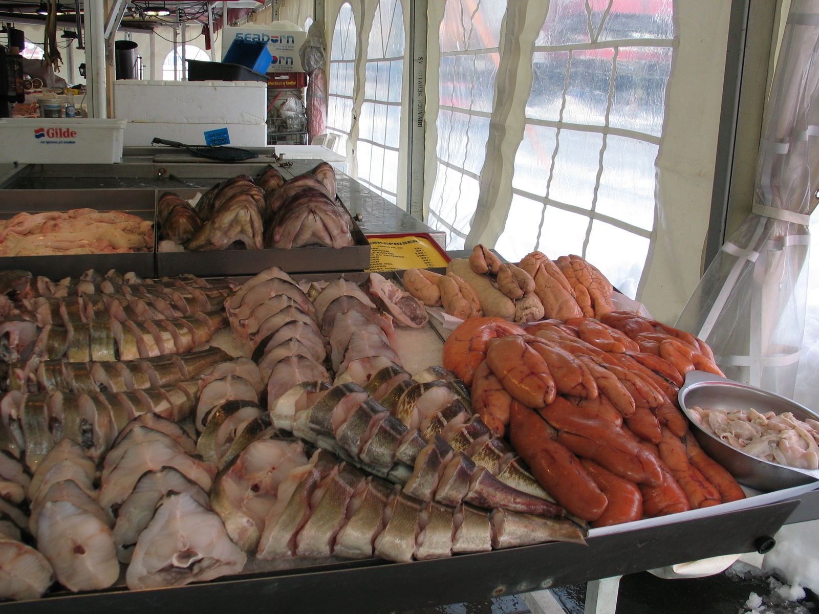 fish market